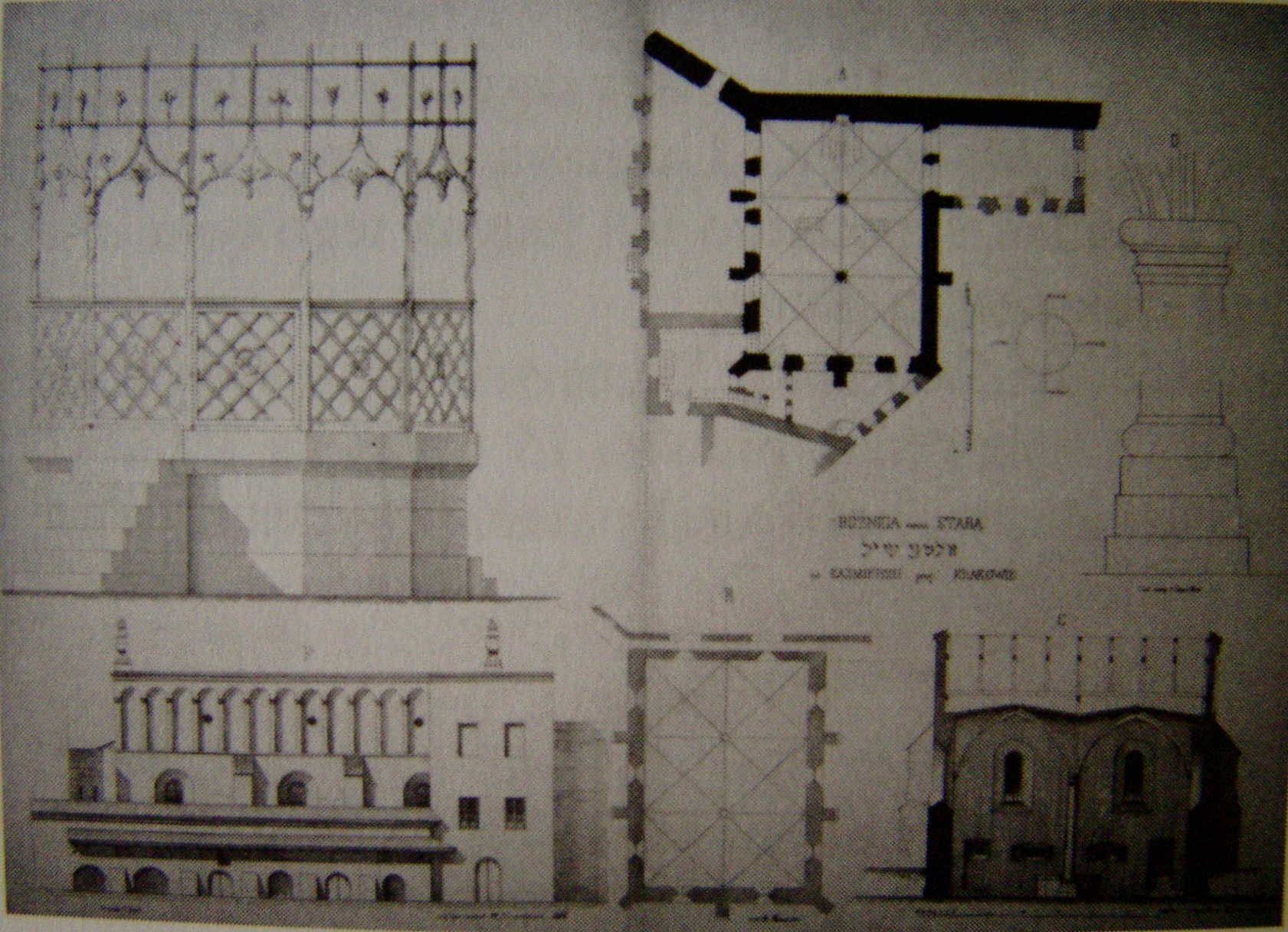 Rysunek inwentaryzacyjny Starej Synagogi w Krakowie